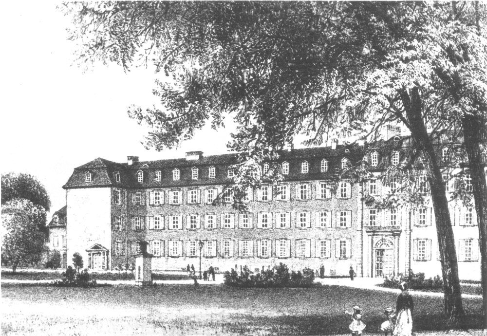 Lithographie Robert Geissler, "Altstädter Schloß". Ansicht des Fürstenbaus von der Parkseite aus gesehen, um 1880.